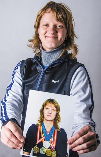 Анна Чепелева. Заслуженный мастер спорта. Серебряный призер Олимпийских игр (Сидней, 2000) по спортивной гимнастике. Фотография из серии «Лица эстафеты».